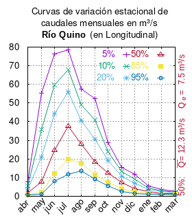 Curvas de variación estacional del río Quino en Longitudinal. # Dirección General de Aguas # Diagnóstico y clasificación de los cursos y cuerpos de agua según objetivos de calidad. Cuenca del río Imperial. # Santiago de Chile # Ministerio de Obras Públicas (Chile) # 2004 # url: # urlarchivo: # Tabla 4.5: Río Quino en Longitudinal (m3/s) , pág. 49 mes 5% 10% 20% 50% 85% 95% abr 7.721 5.46 3.631 1.763 0.858 0.633 may 55.376 35.832 21.149 7.72 2.231 1.076 jun 76.33 59.578 44.134 24.859 12.26 8.096 jul 78.533 67.736 56.078 37.505 20.003 11.902 ago 57.584 49.111 40.499 28.017 17.795 13.631 sep 52.439 40.834 30.564 18.538 11.384 9.22 oct 28.742 23.954 19.204 12.577 7.449 5.466 nov 15.314 13.185 10.871 7.212 3.978 2.651 dic 11.887 9.391 7.059 4.091 2.089 1.408 ene 5.422 4.532 3.647 2.407 1.443 1.069 feb 3.845 3.081 2.412 1.637 1.184 1.05 mar 2.419 2.143 1.855 1.42 1.034 0.858 This plot was created with Gnuplot.